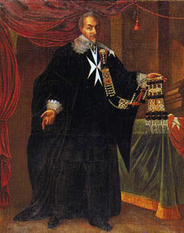 Honoré Quinqueran de Beaujeu, grand prieur de l'ordre des Hospitalier à Saint-Gilles